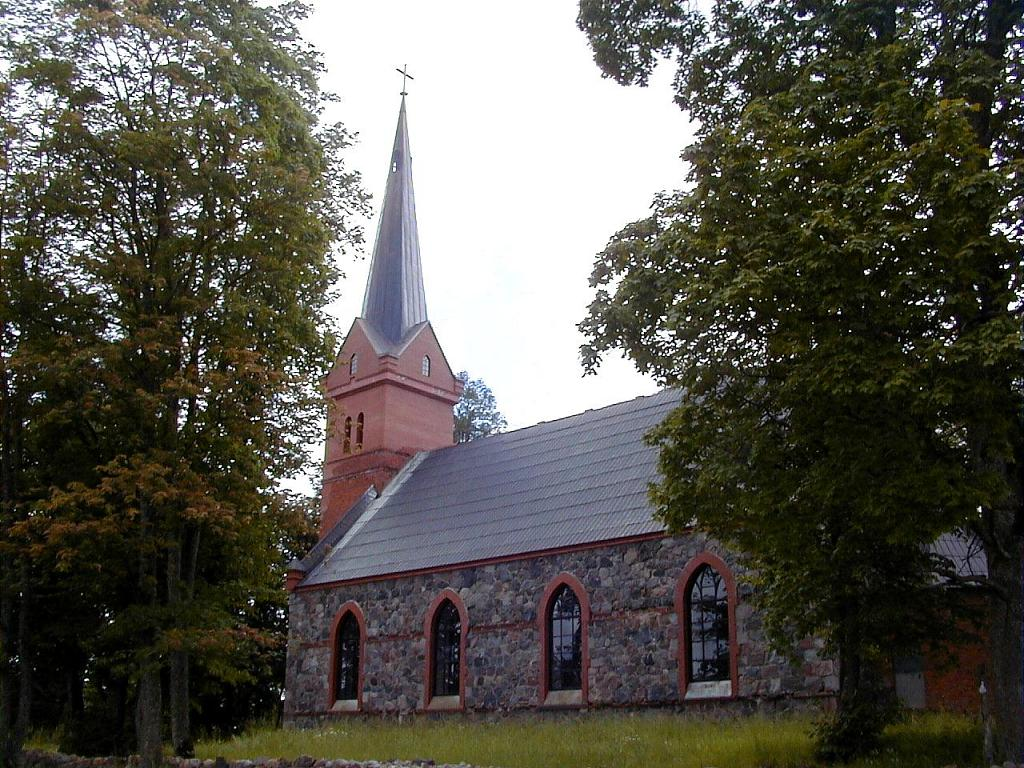 Ropažu luterāņu baznīca 2004-07-08